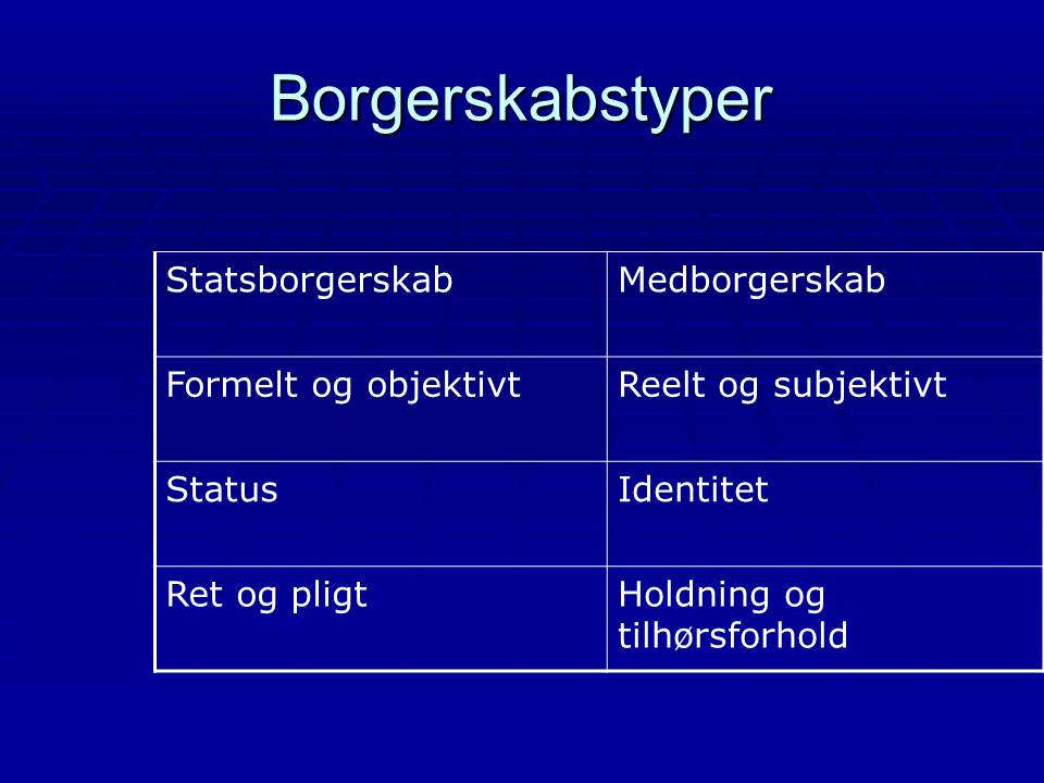 model til politisk analyse